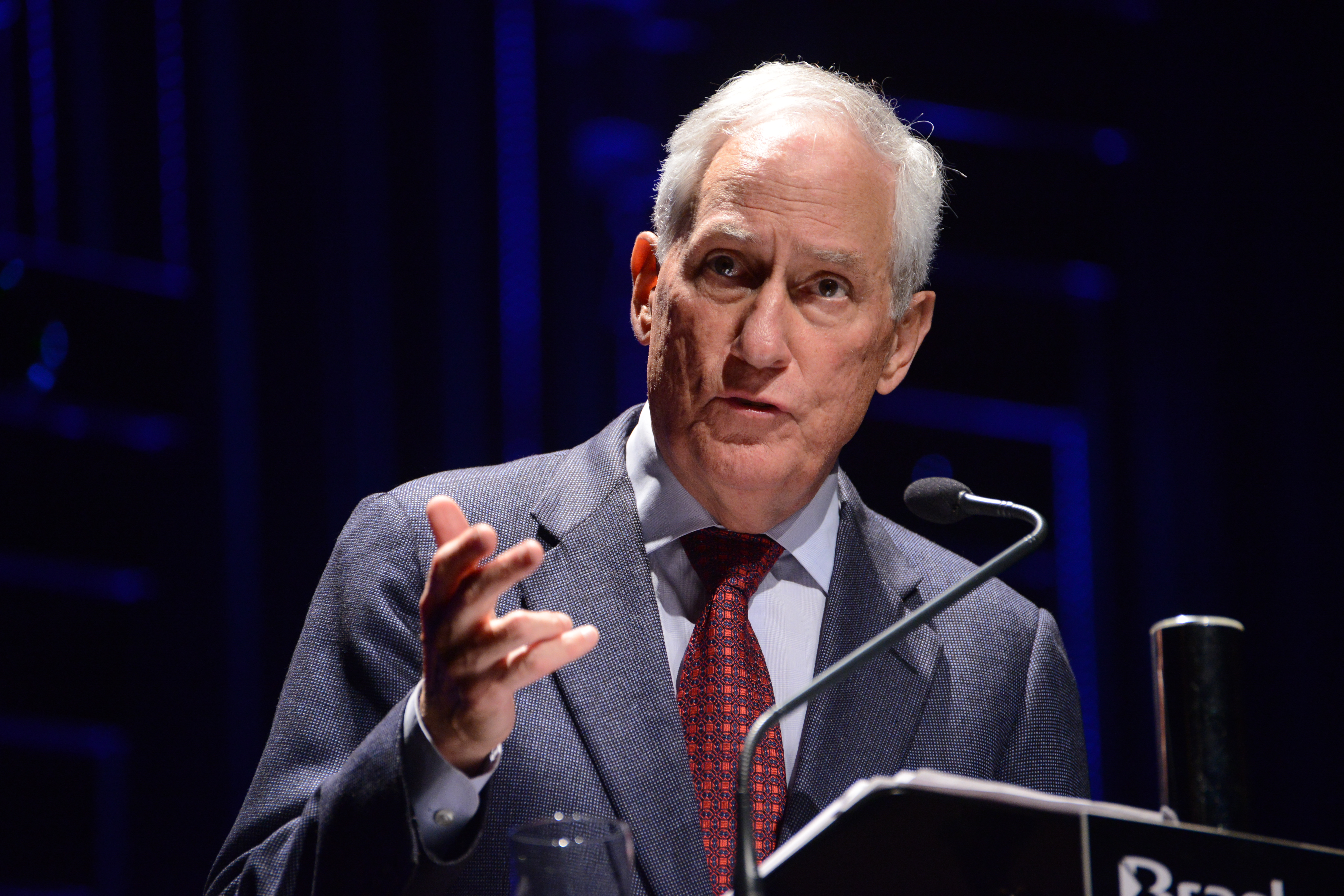 Convidado: Robert Darnton, historiador norte-americano Data: 29 agosto de 2016 Crédito das imagens: Fronteiras do Pensamento | Luiz Munhoz